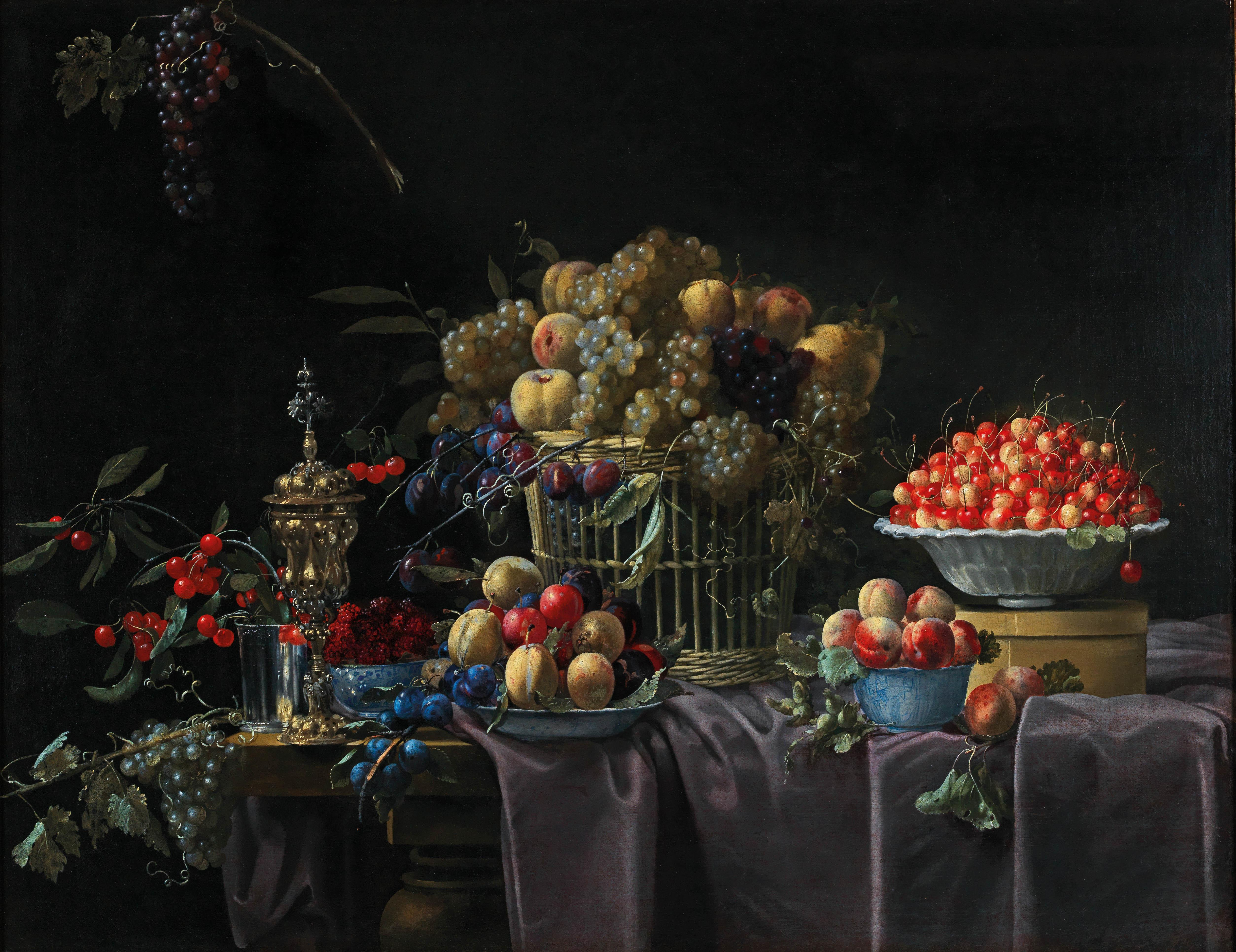 Stillleben mit Traubenkorb, einer Schale mit Kirschen und einem silbervergoldeten Akeleipokal auf einem Tisch